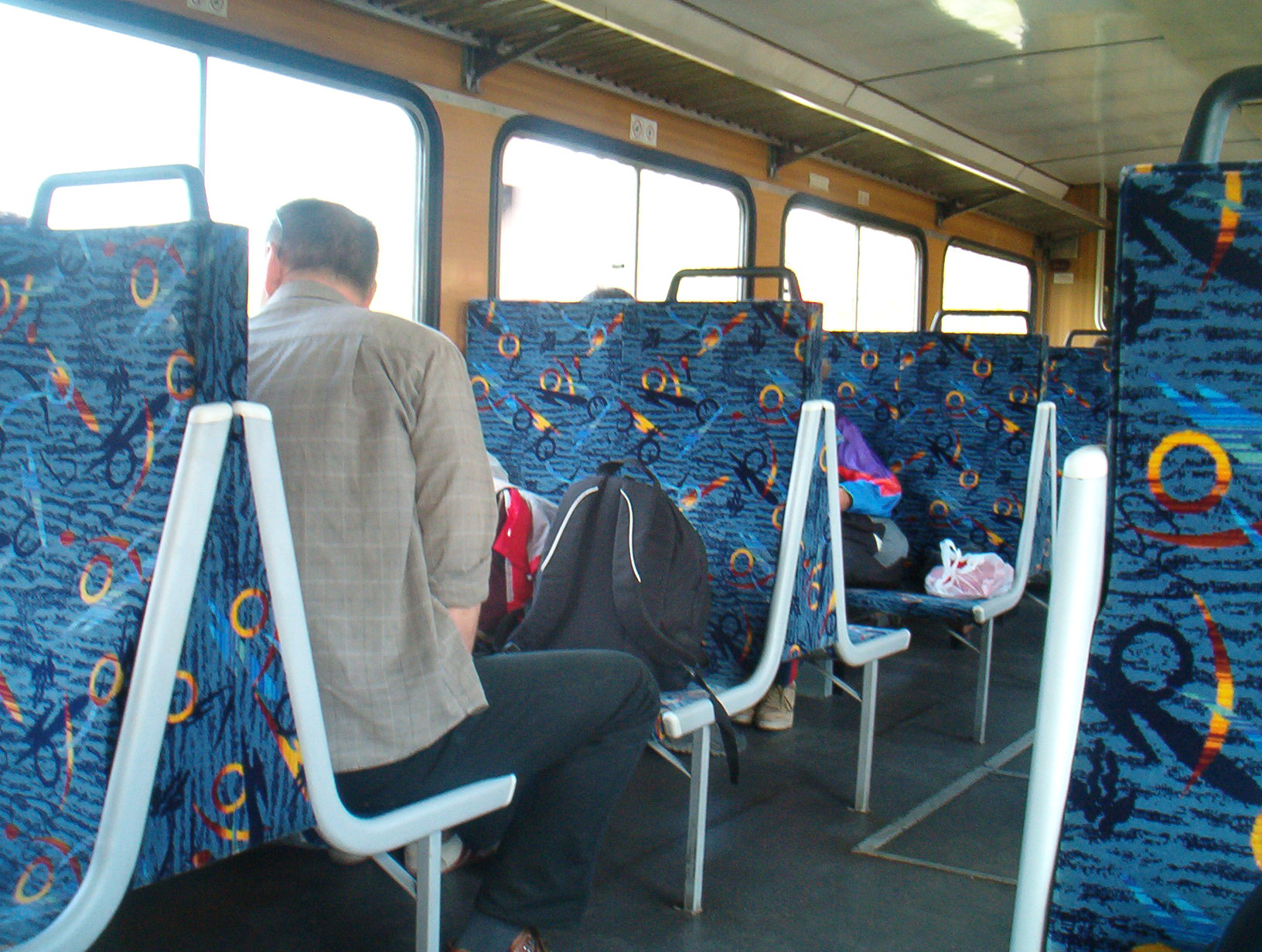 Wnętrze szynobusu SA102-001.